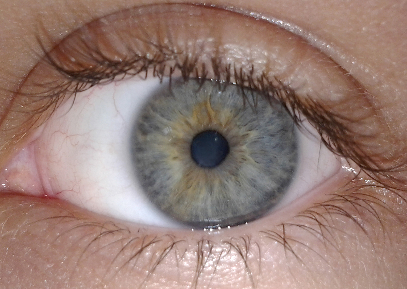 ageev_iris